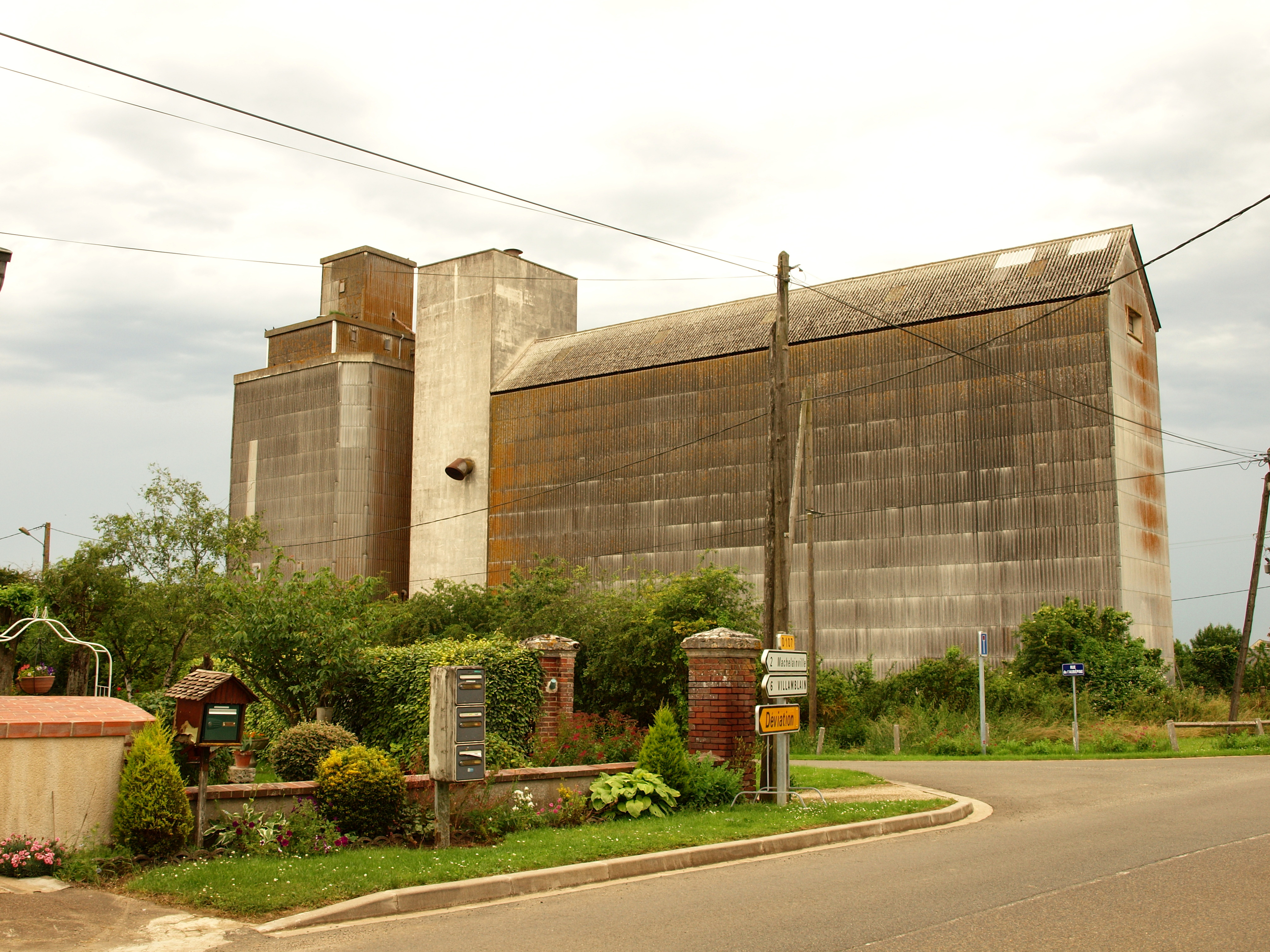 Péronville (Eure-et-Loir, France)